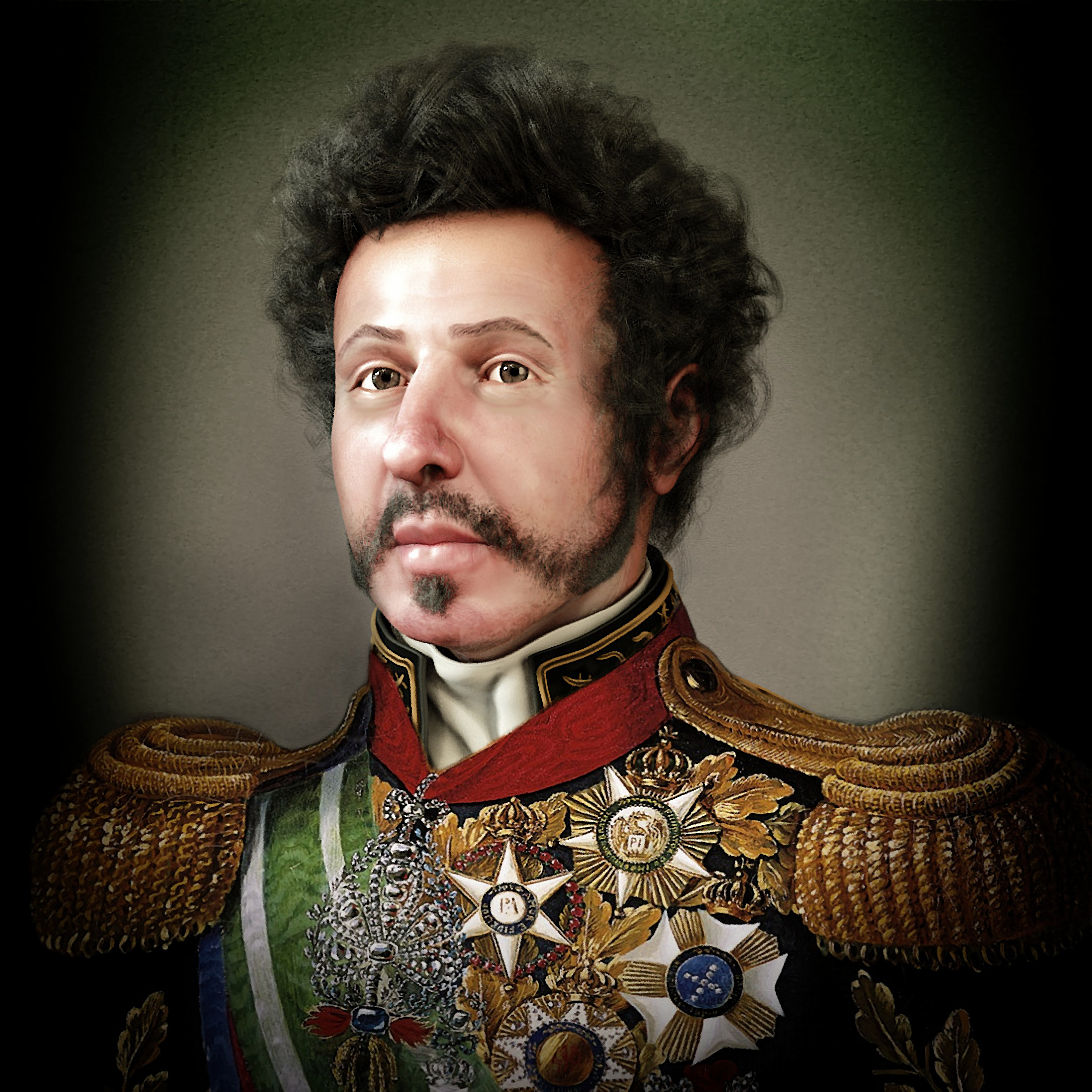 Reconstrução facial forense de D. Pedro I. Um trabalho coordenado pelo Dr. José Luís Lira e aprovado por D. Bertrand de Orleans e Bragança. Consultoria Forense: Dr. Marcos Paulo Salles Machado. Reconstrução digital: Cicero Moraes.